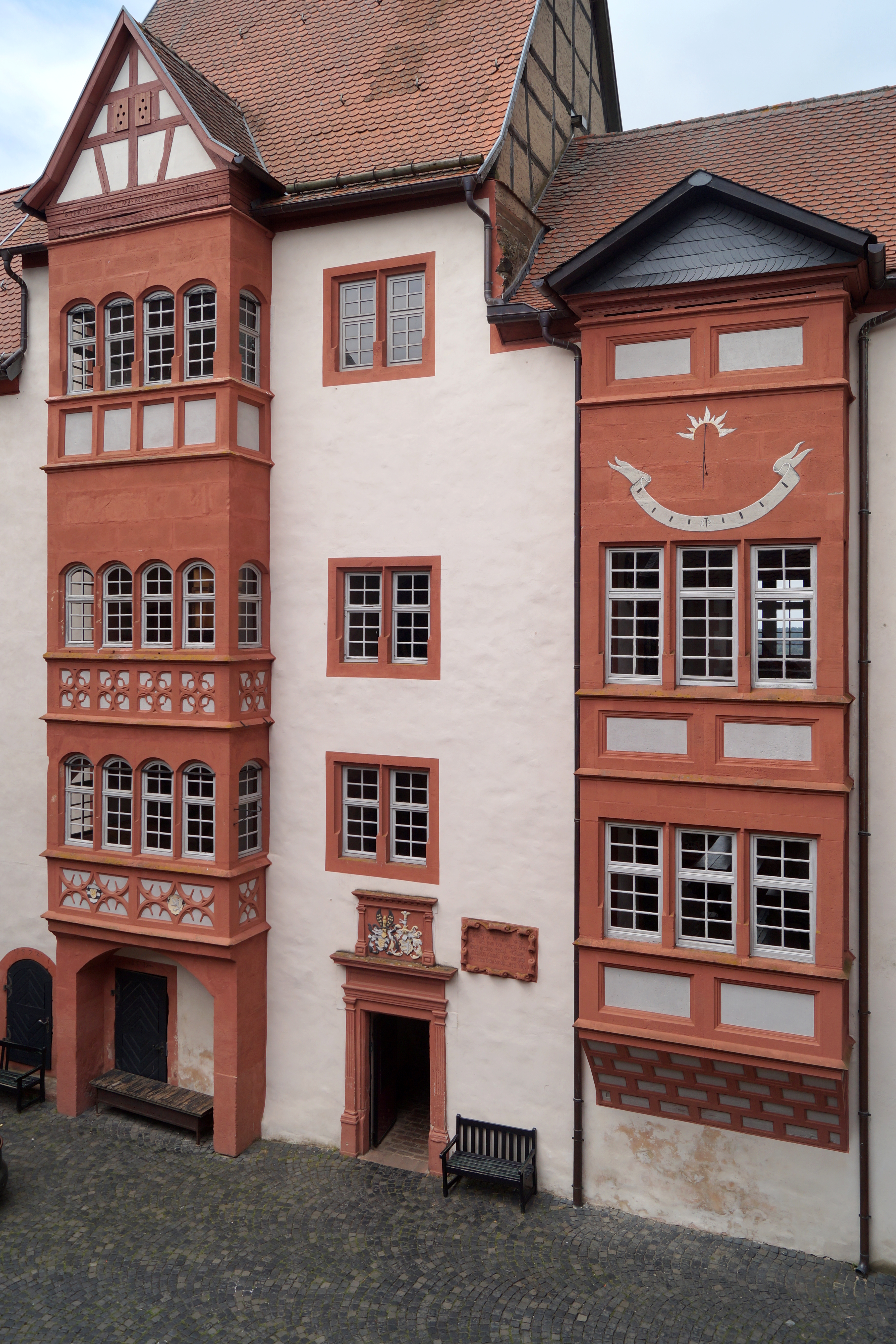 Burg Ronneburg, Hessen, renaissancezeitliche Erker der Neuen Kemenate zum Innenhof der Kernburg.